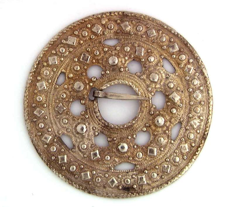 Støpt slangesølje i forgylt sølv, innkommet fra Bygland i Aust-Agder. Foto Anne-Lise Reinsfelt / Norsk Folkemuseum, NF.1897-0656.